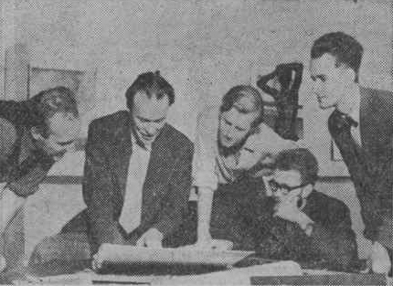 Dagens skola - expo. Från vänster arkitekterna Lennart Kolte, Bengt Hidemark, David Price (Liverpool), Stig Jacobsson och Ingvar Yggesson studerar ett skolförslag